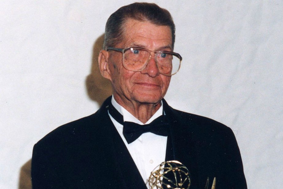 Eugene Polley en 1995 lors de la cérémonie où il fut récompensé par un Emmy Award .